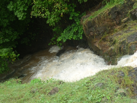 Lago soberania, Villa Lourdes, Los Santos